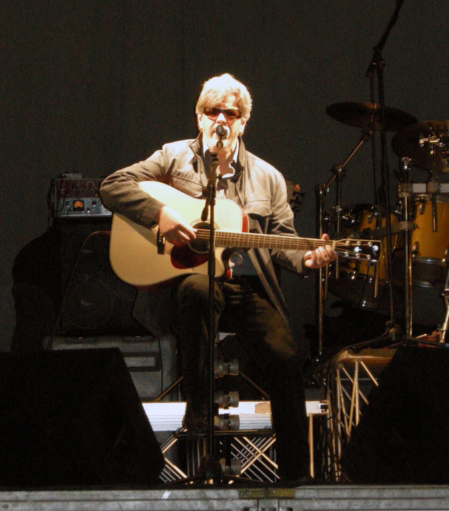 Aleandro Baldi live 2008